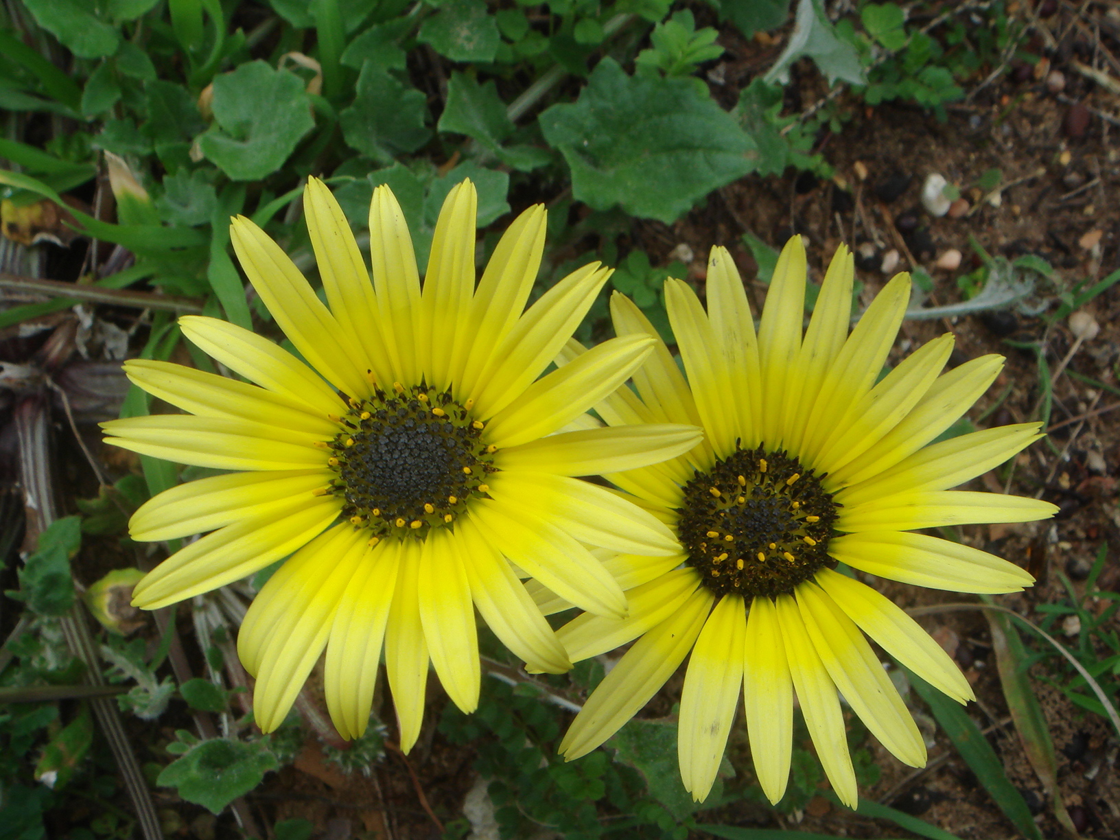 Arctotheca calendula , Chiclana de la Frontera (Cádiz), España